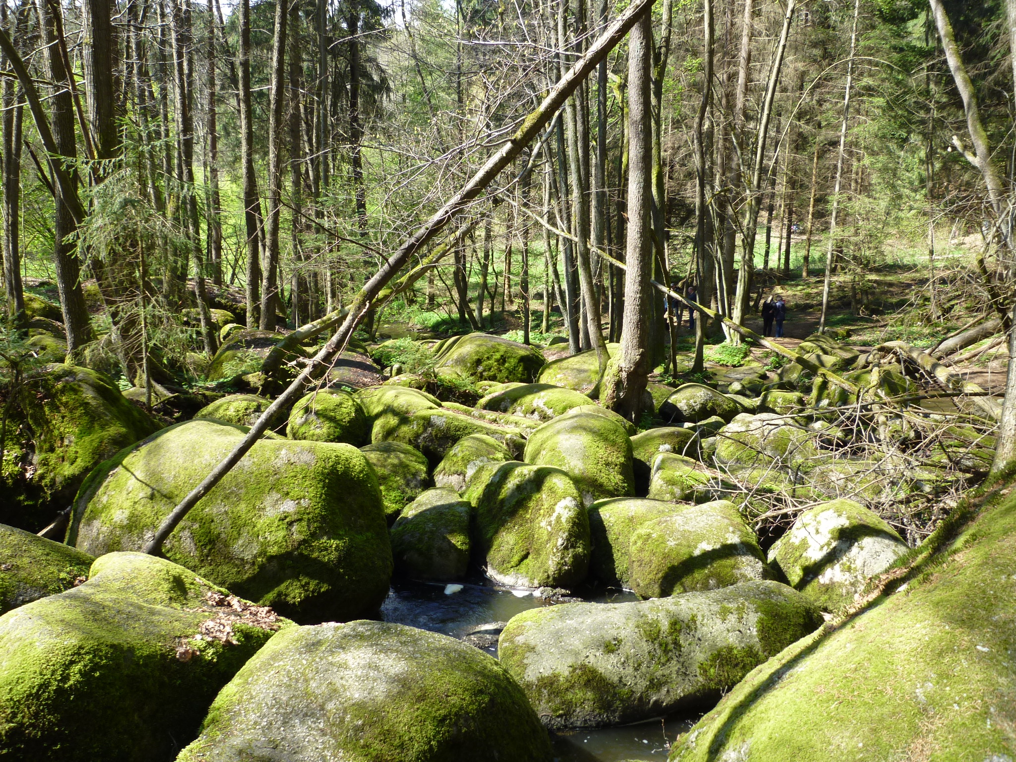 Das Naturschutzgebiet Hölle ist eine wildromantische Schlucht. Der Rund-Wanderweg führt vom Wanderparkplatz Postfelden nach Dosmühle und wieder zurück.